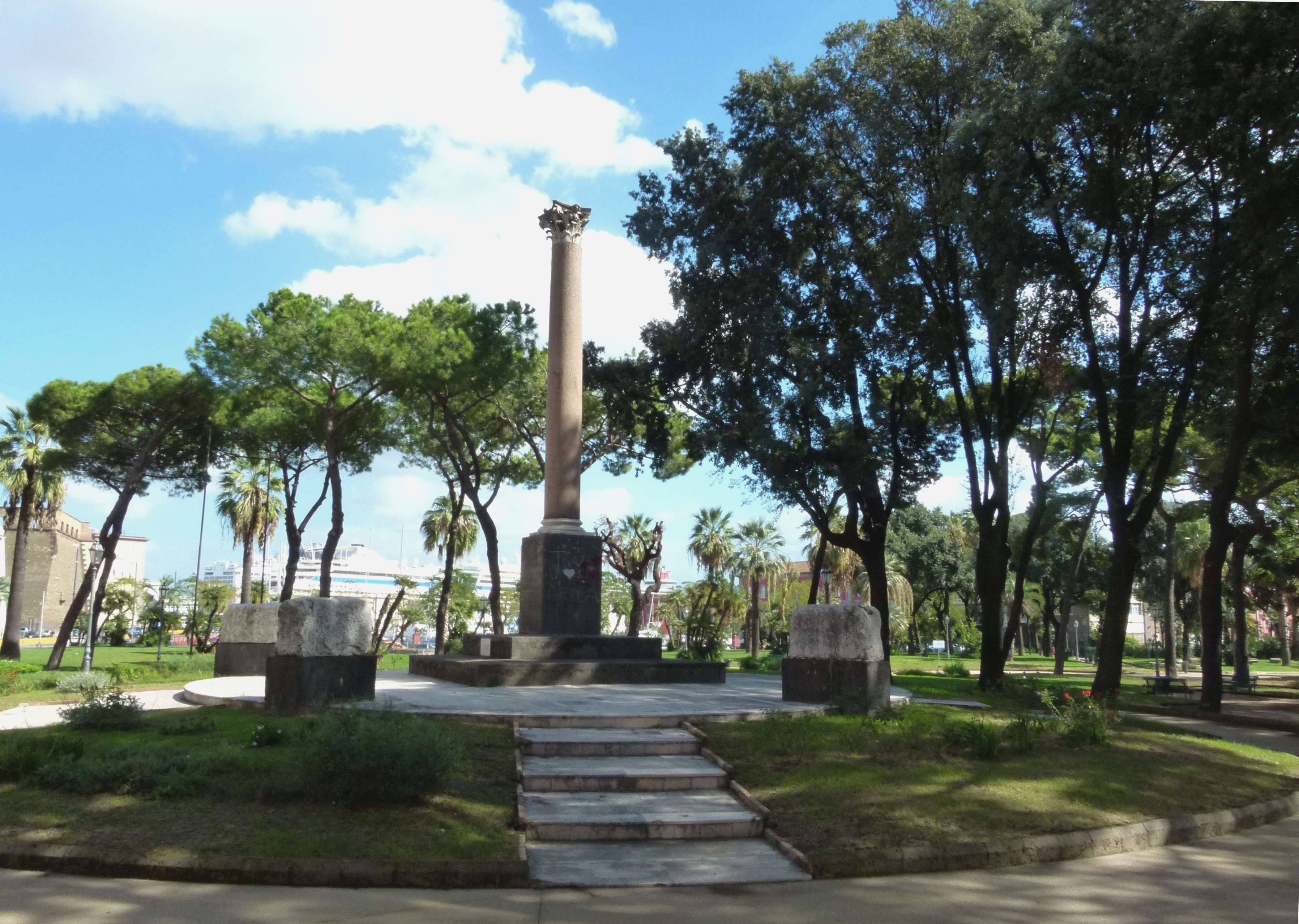 Napoli, Giardini del Molosiglio - Monumento ai caduti di El Alamein (di Armando Tripodi). La colonna antica in granito rosa, proviene dalla Collezione Farnese.